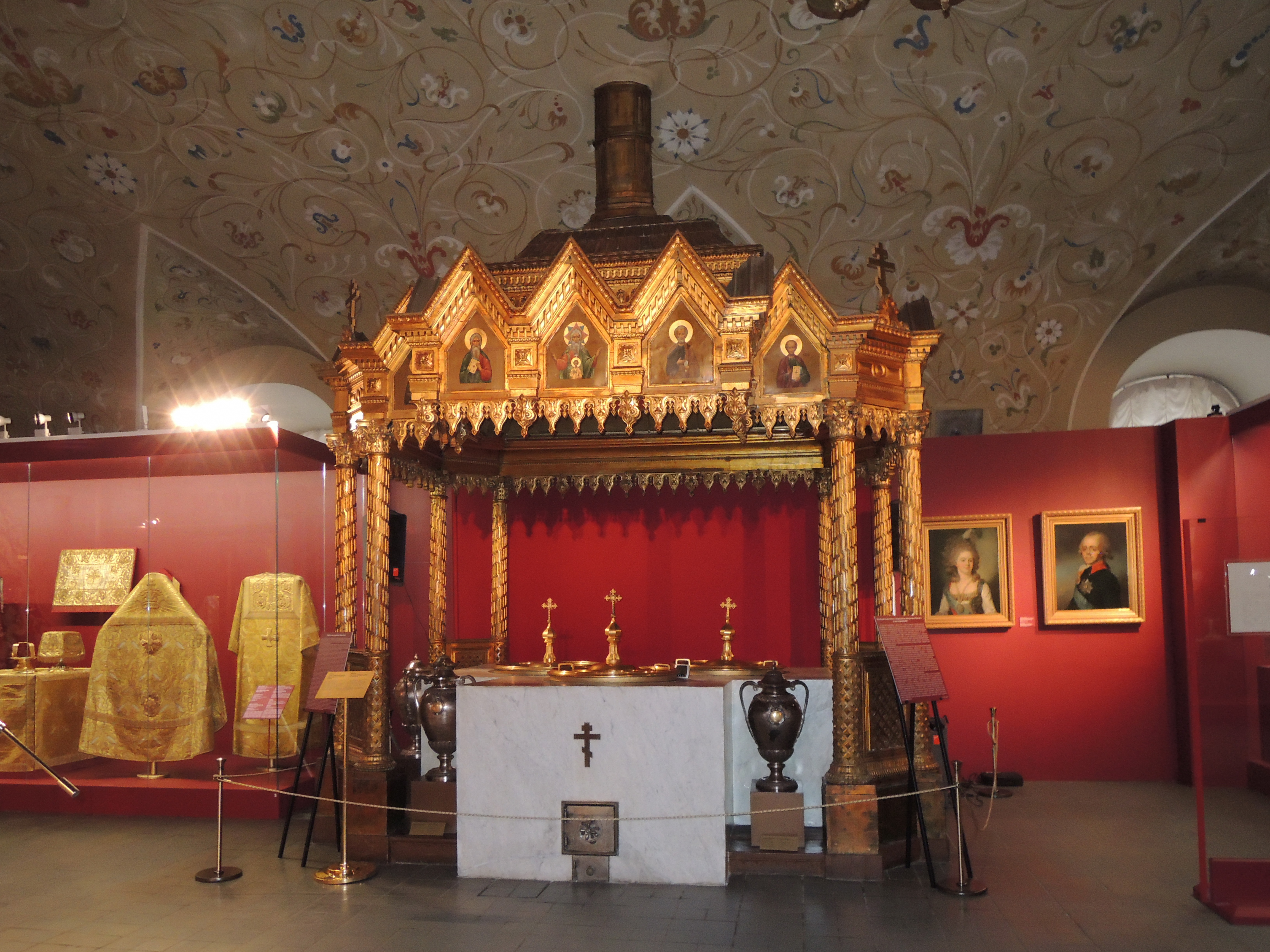 Мироваренная палата Патриаршьей резиденции Московского Кремля